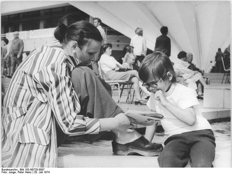 Berlin, Straßenszene ADN-ZB Junge 28.7.4-hf-Berlin: Bevor der Bummel durch das neuerbaute Stadtzentrum weitergehen kann, muß Mutti Elke Hirschberger ihrem 5jährigen Sohn Magnar erst einmal den neuen Bummi vorlesen.